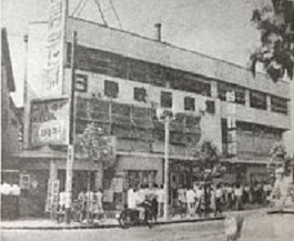 池袋日勝映画劇場、1954年